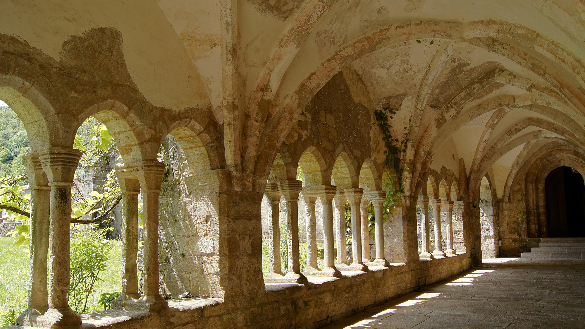 Construit dans la deuxième moitié du XIIème siècle, le cloître est voûté tardivement, au XIIIème siècle, afin de supporter une galerie supérieure aujourd'hui disparue.